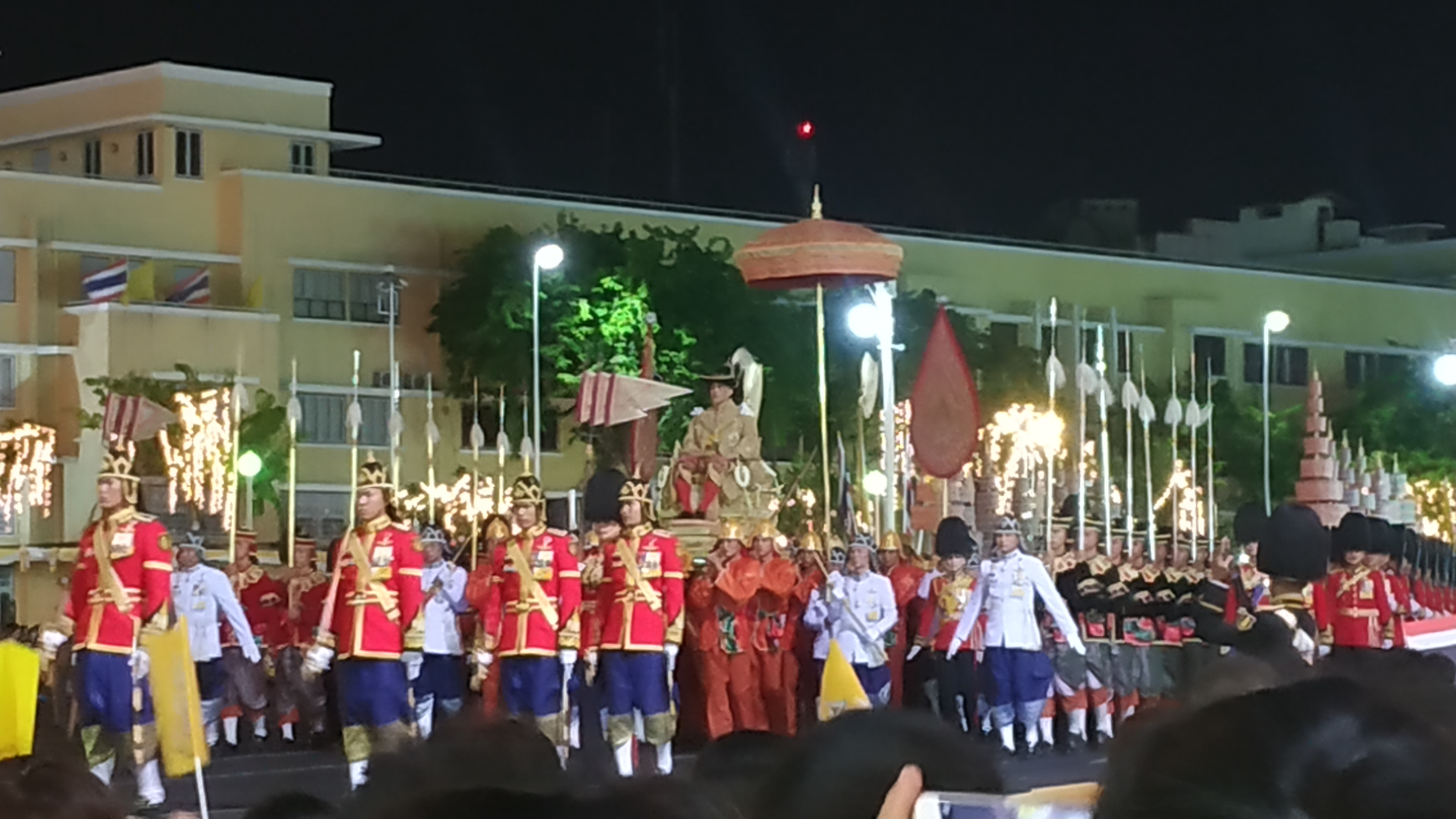 กระบวนพยุหยาตราสถลมารคเลียบพระนคร เนื่องในการพระราชพิธีบรมราชาภิเษก พระบาทสมเด็จพระปรเมนทรรามาธิบดีศรีสินทรมหาวชิราลงกรณ พระวชิรเกล้าเจ้าอยู่หัว วันที่ 5 พฤษภาคม พ.ศ. 2562 บันทึกภาพที่อนุสาวรีย์ประชาธิปไตย บริเวณปากถนนดินสอต่อกับถนนราชดำเนินกลาง